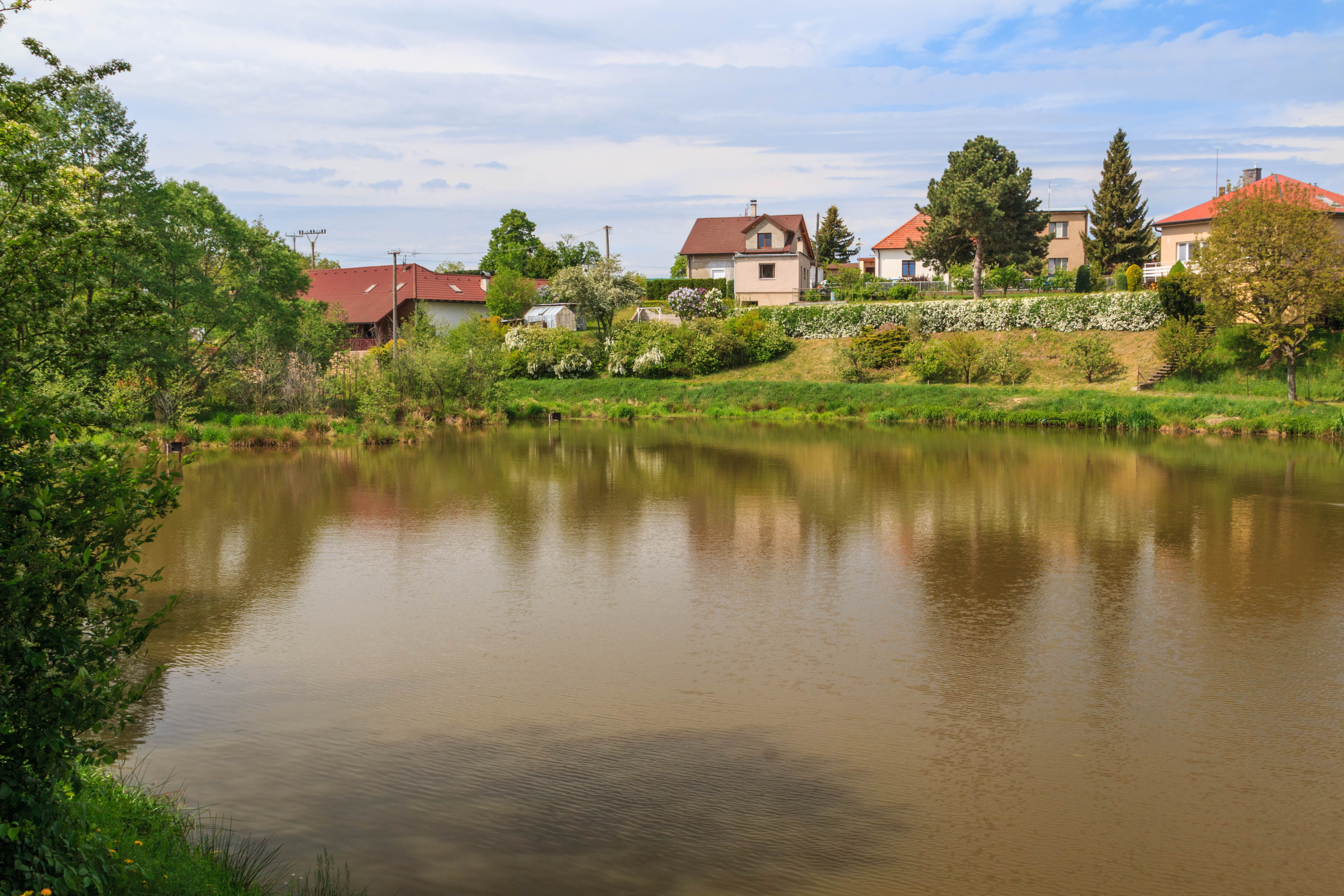 Rybník Konopka u Heřmanova Městce Rybník Ježkovka